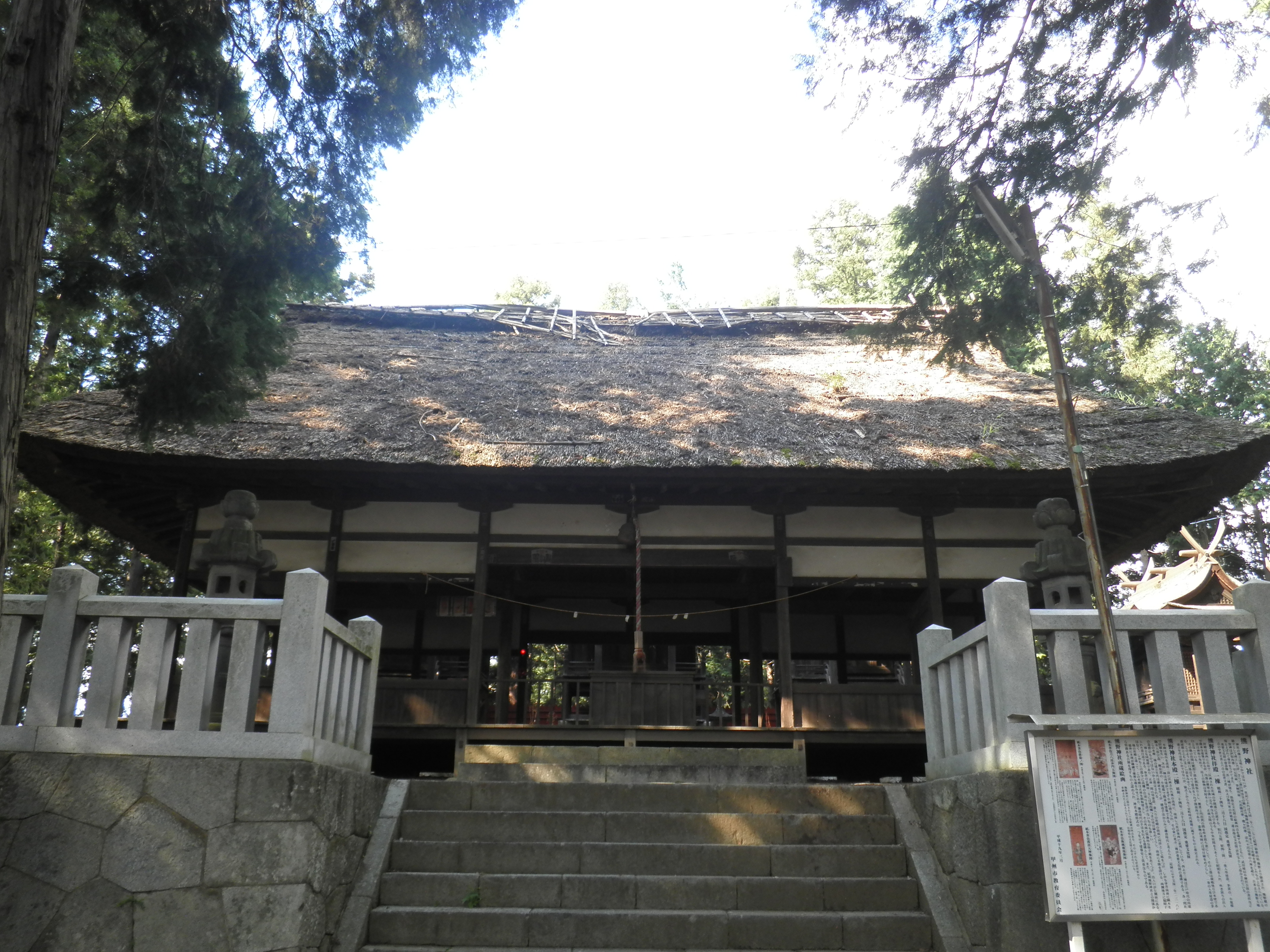 甲州市・熊野神社の拝殿